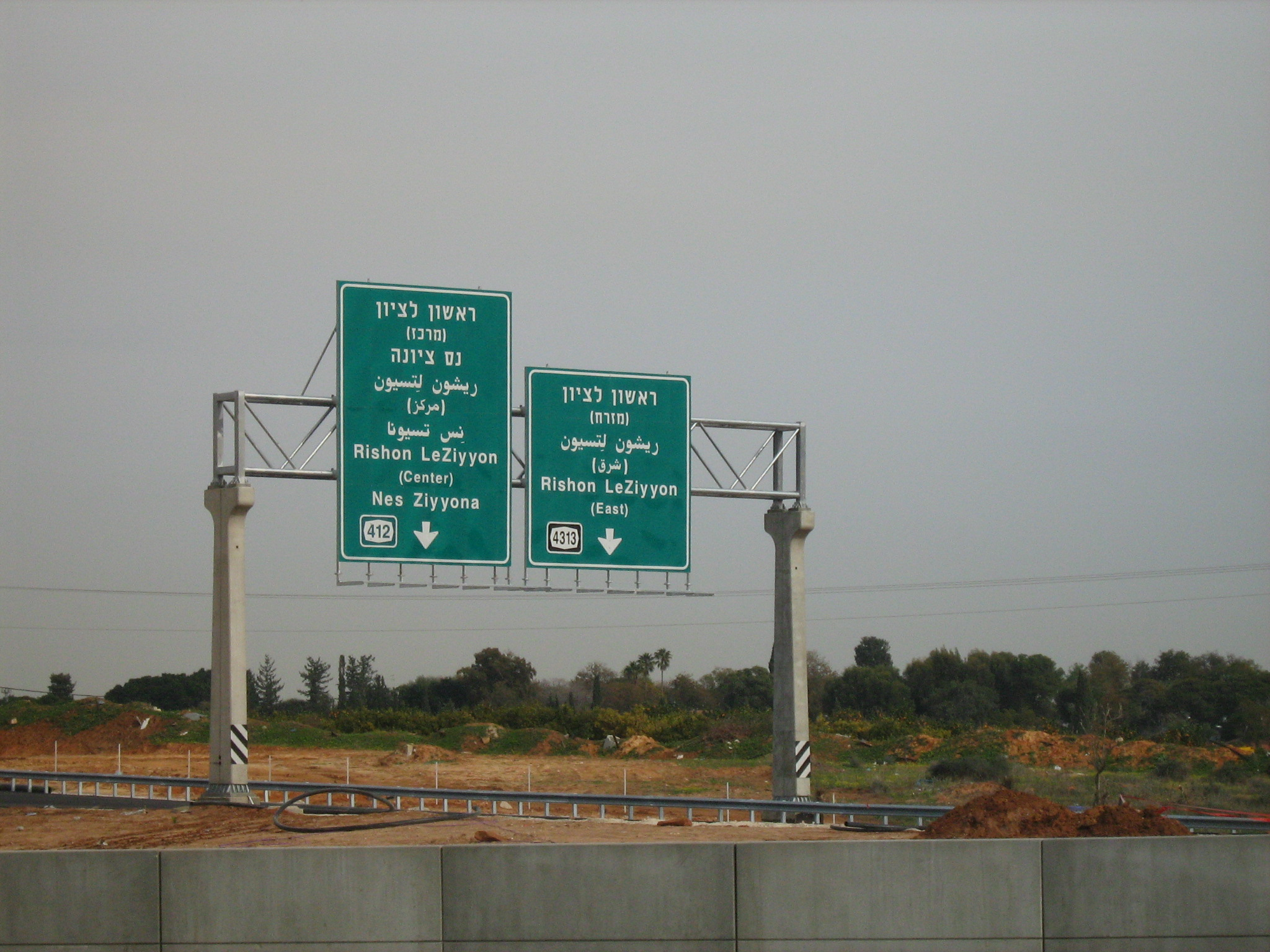 כביש 431 סמוך למחלף נס ציונה